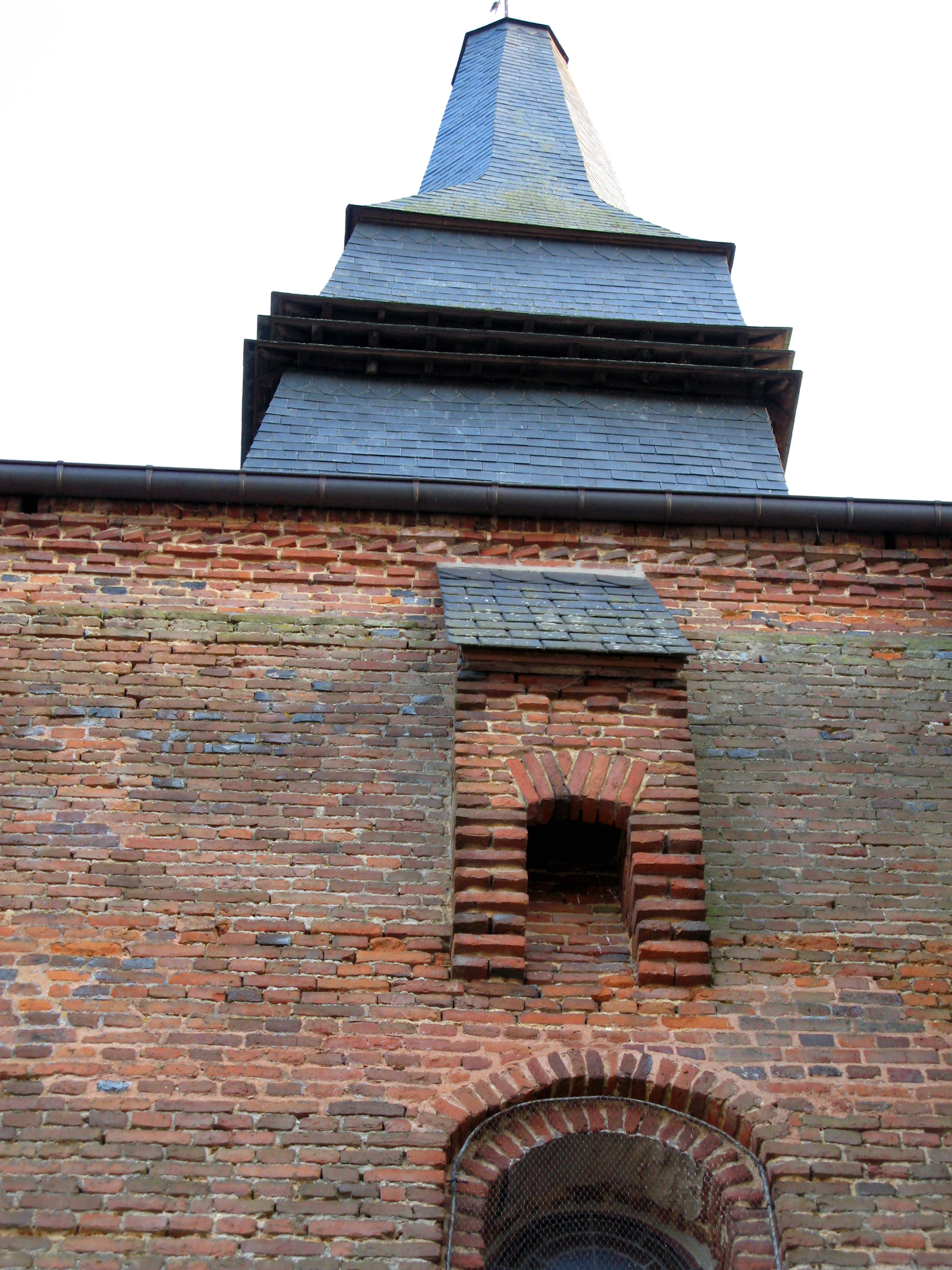 Archon (Aisne, France) - Bretèche de la façade Nord de l'église fortifiée. C'est bien de la façade Nord qu'il s'agit et non de la façade Sud. Je me suis trompé en nommant le fichier. Quand j'aurai le temps, je le renommerai.